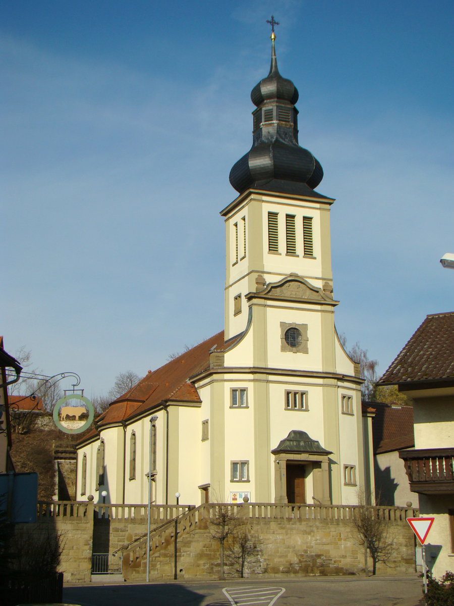 Kath. Dreifaltigkeitskirche in Eppingen-Elsenz